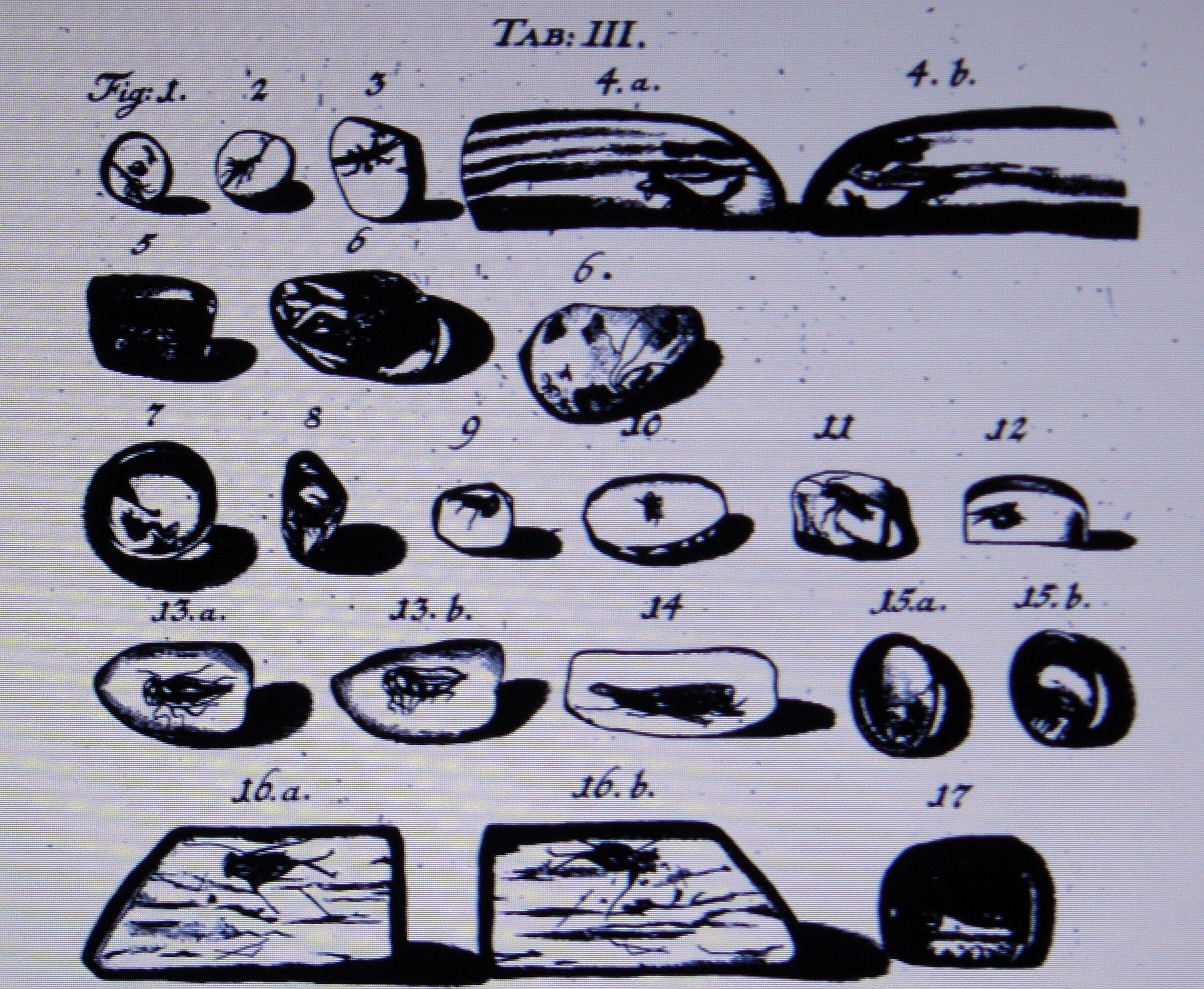 Zeichnerische Darstellung verschiedener organischer Einschlüsse in Bernstein aus Nathanael Sendel: "Historia succinorum ..." (1742) (drawing of several organic inclusions into amber)